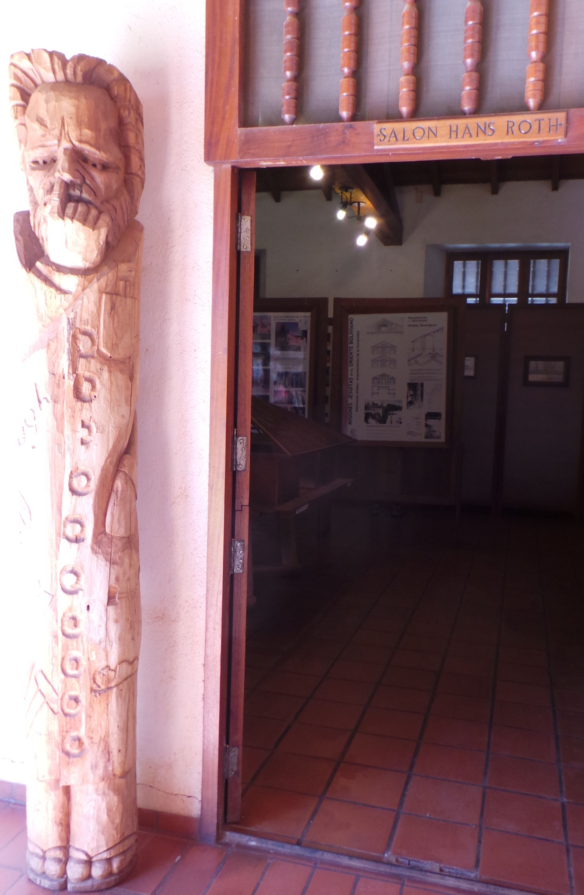 Homenaje al arquitecto suizo restaurador de la Catedral de Concepción en el Museo Misional